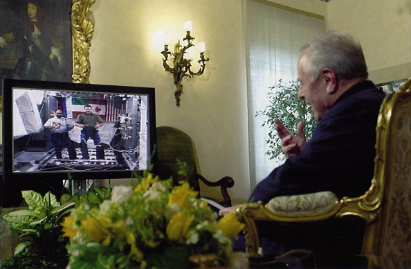 Collegamento tra il President Ciampi e l'astronauta Guidoni in volo a bordo dello shuttle Endeavour.